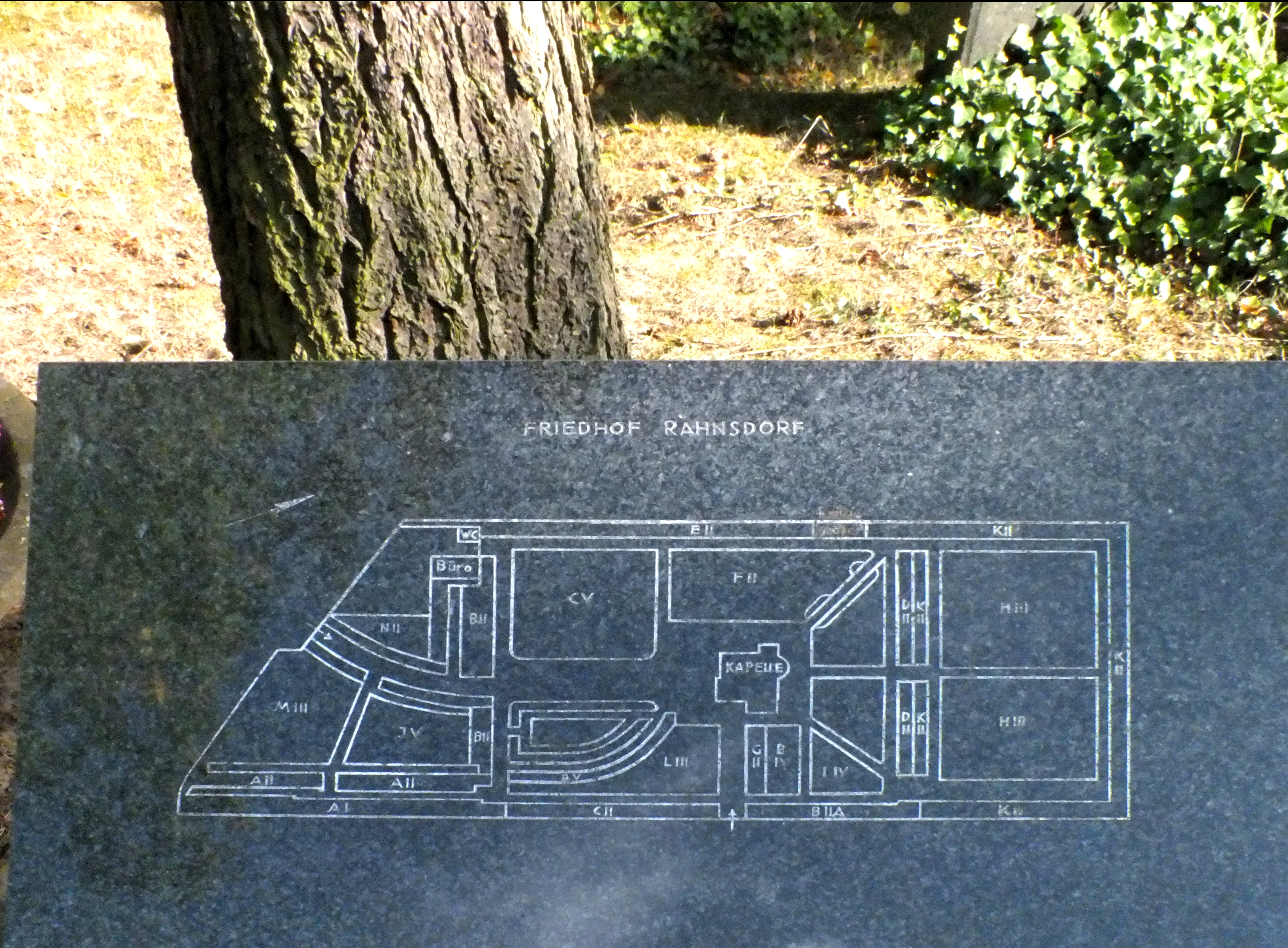 Straße in Berlin-Rahnsdorf, Friedhof Rahnsdorf; Lageplan der Anlage